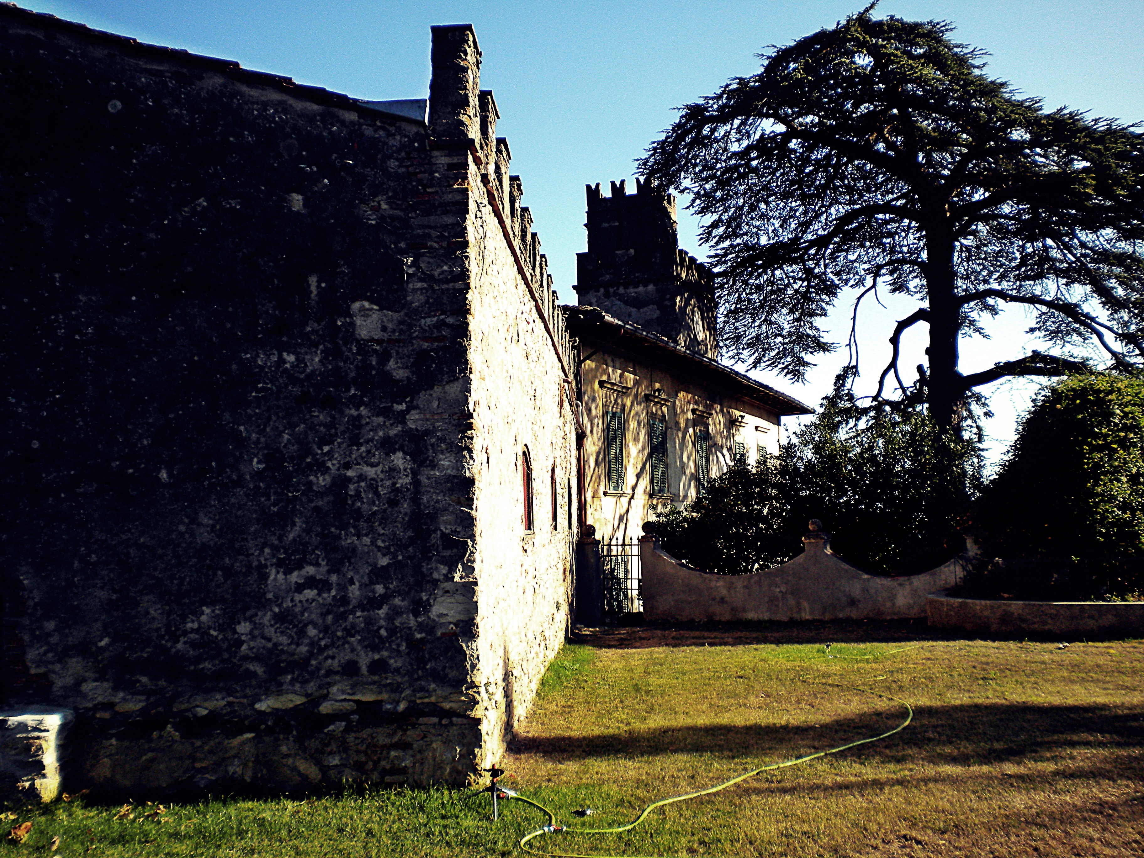 villa